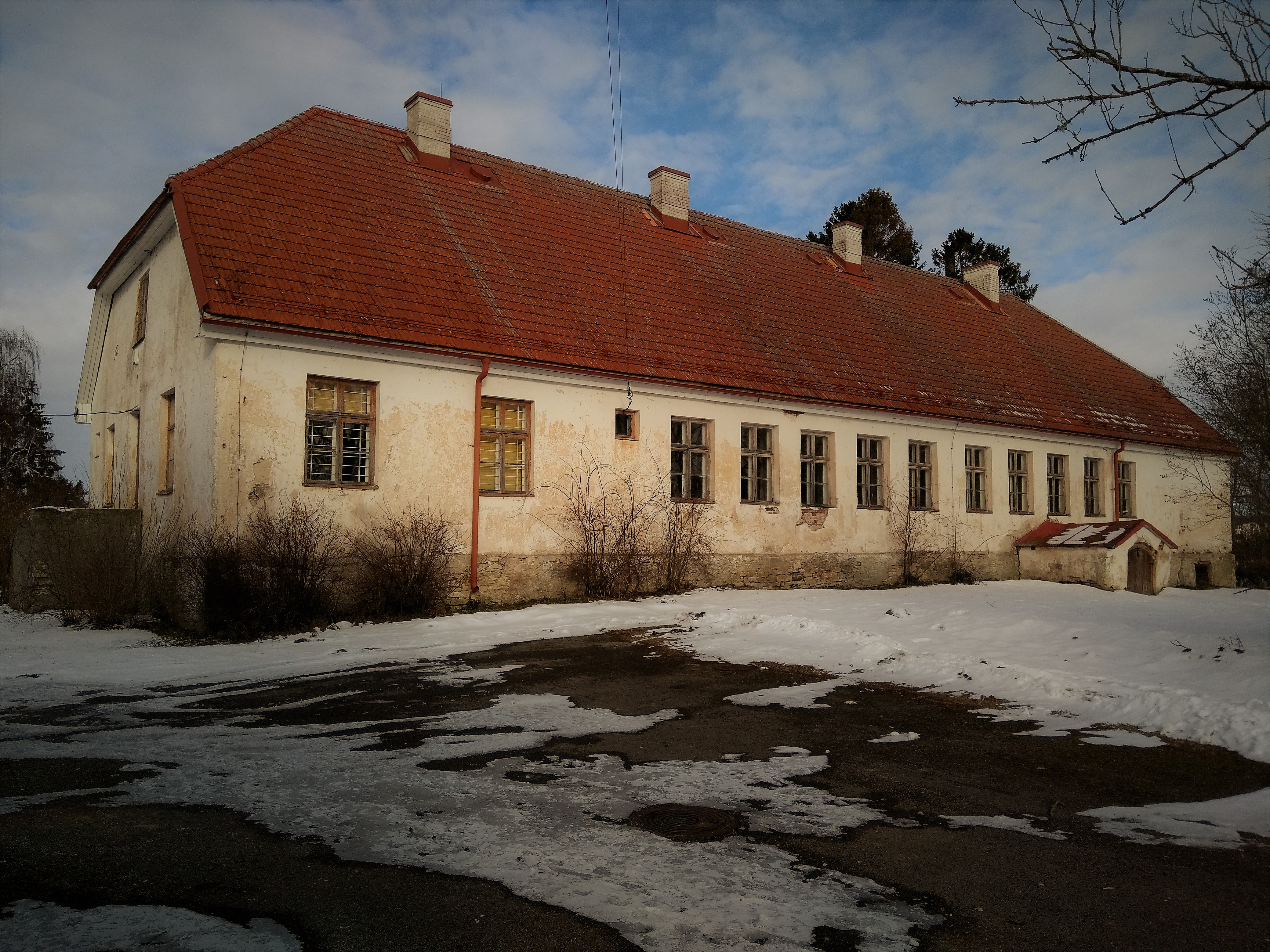 Vaade Koonga mõisa peahoonele edelast, märtsis 2019 a.